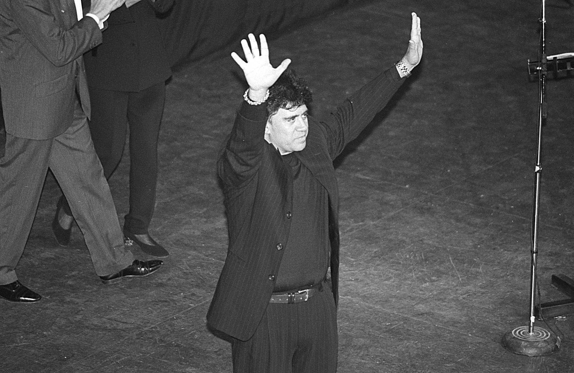 1993 XIII Muestra de Cine Mexicano en Guadalajara Ceremonia de clausura y premiación Pedro Almodóvar.